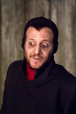 "שחר רז בתפקיד הרב בהצגה "השבועה